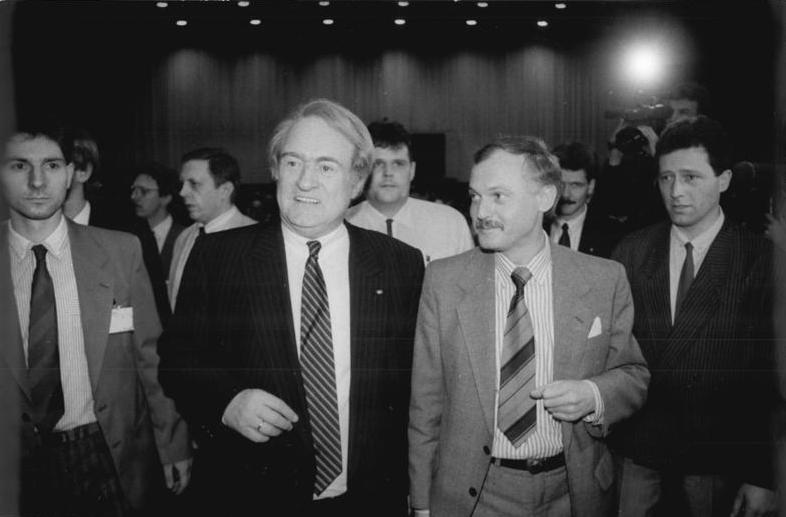 ADN-ZB-Grimm-13.3.90 Berlin: Johannes Rau, Ministerpräsident von Nordrhein-Westfalen (M.), nahm an einer Wahlveranstaltung der SPD in der Dynamohalle teil, auf der sich Kandidaten für die bevorstehende Volkskammerwahl vorstellten. 2.v.r.: Ibrahim Böhme, Vorsitzender der SPD der DDR.